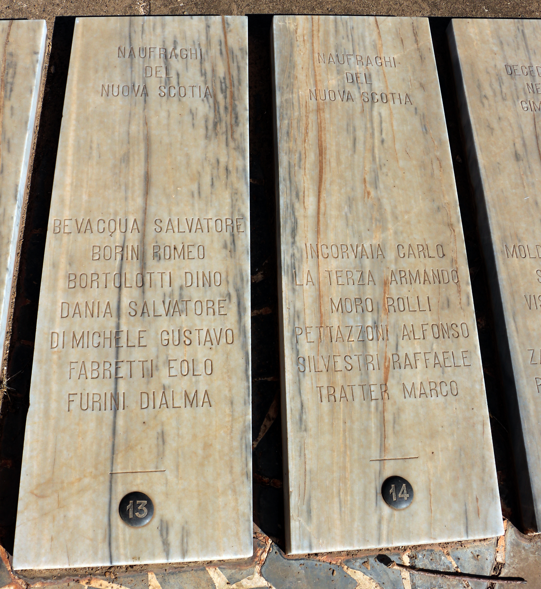 Cimitero italiano di asmara, memoriale caduti dell'agip, 03 naufragi del nova scotia.JPG